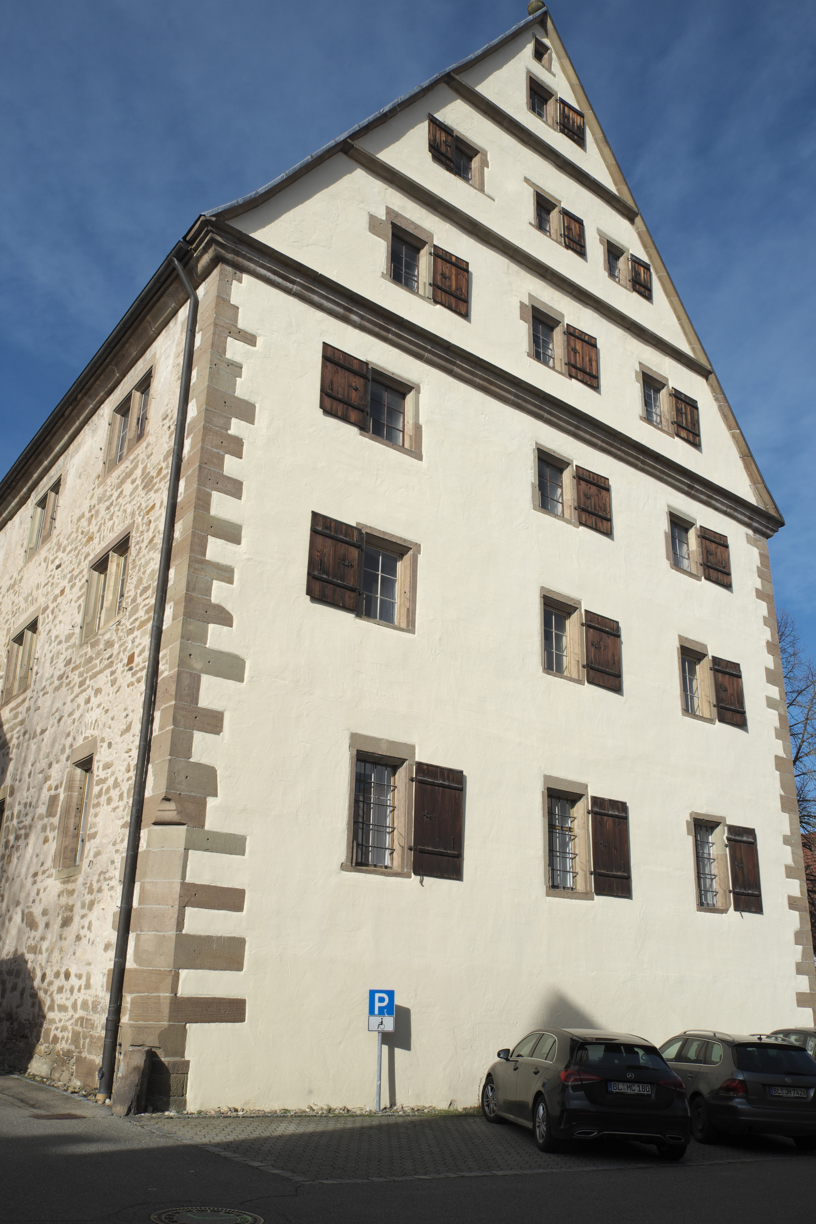 Fruchtkasten in Rosenfeld im Zollernalbkreis (Baden-Württemberg/Deutschland)